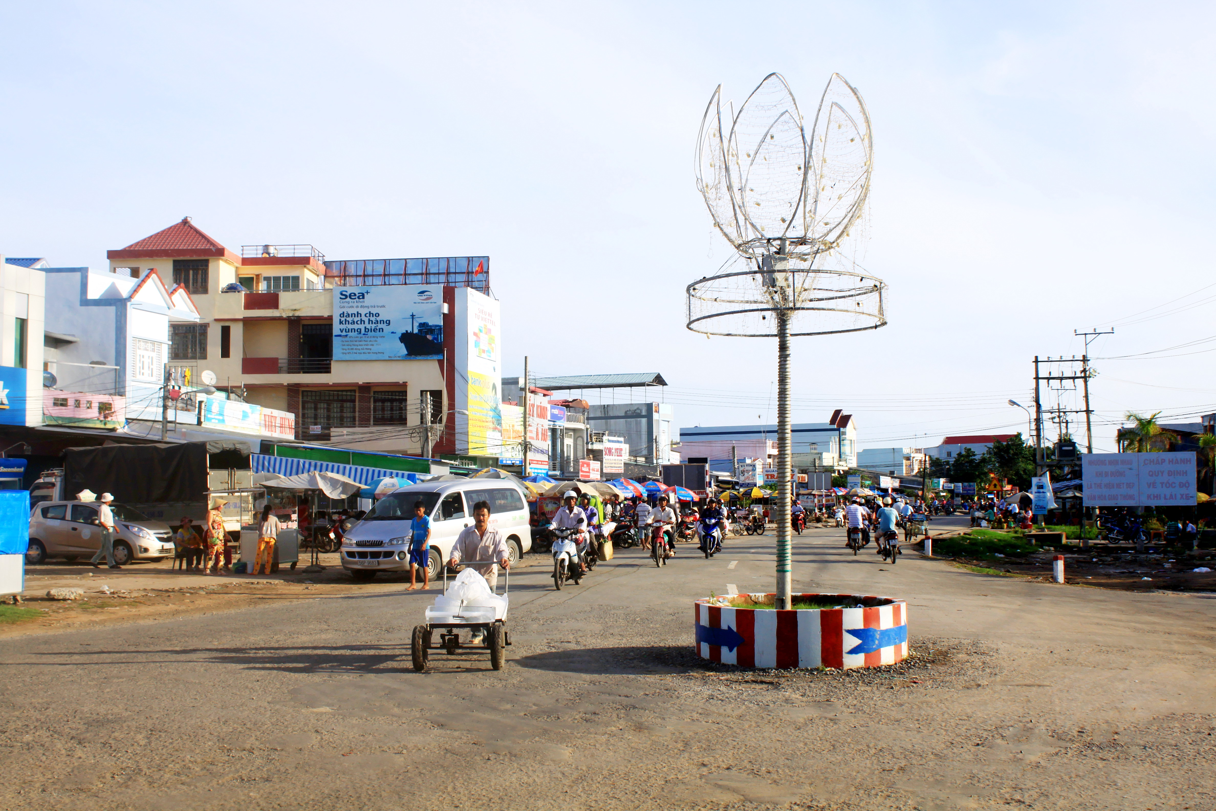 Vòng xoay ở chỗ Bưu điện thị trấn Năm Căn, thuộc huyện Năm Căn, Cà Mau, Việt Nam.